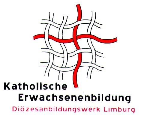 Logo der Katholischen Erwachsenenbildung Diözesanbildungswerk Limburg, Domplatz 3, D 60311 Frankfurt